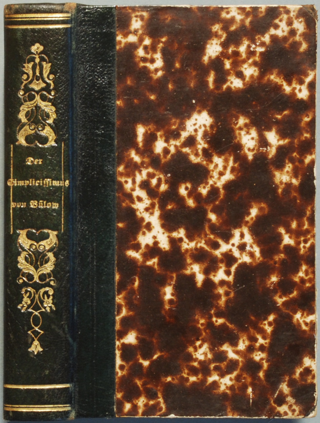 Die Abenteuer des Simplicissimus. Ein Roman aus der Zeit des dreißigjährigen Krieges. Herausgegeben von Eduard von Bülow. Leipzig: F. A. Brockhaus 1836, 240 S.; Halbleder der Zeit kl. 8° (167 x 103 mm) mit Romantiker-Vergoldung.